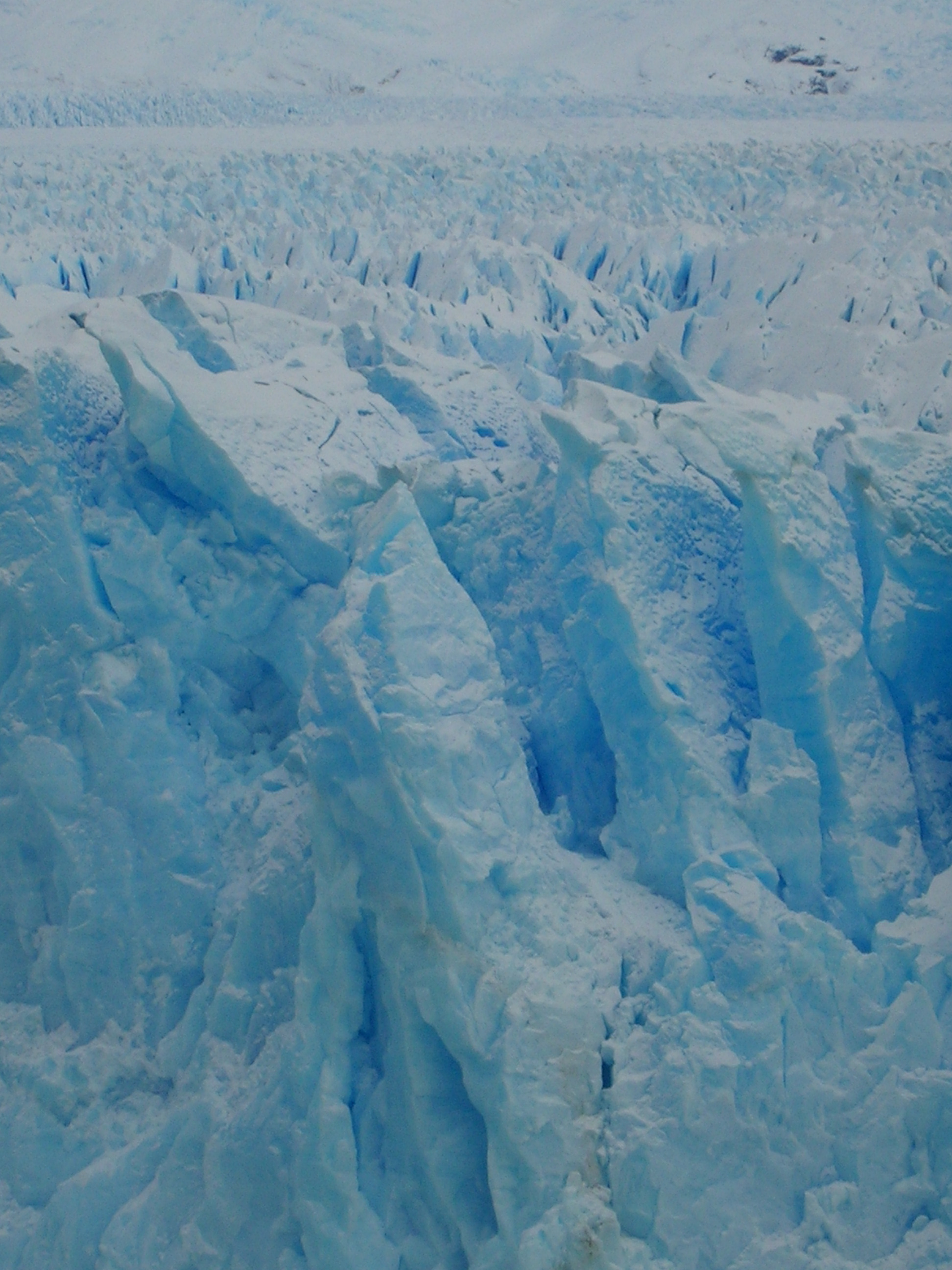 El Perito Moreno